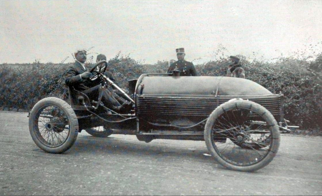 Clifford Earp, vainqueur à la course de côte de Château-Thierry en 1905 sur Napier - La Vie au Grand Air du 6 octobre 1905, p.824-825